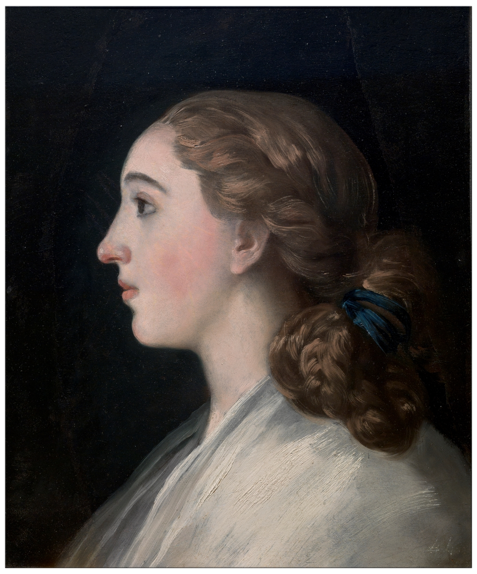 María Teresa de Vallabriga. Óleo sobre lienzo, 48 × 39,6 cm. Madrid, Museo del Prado.